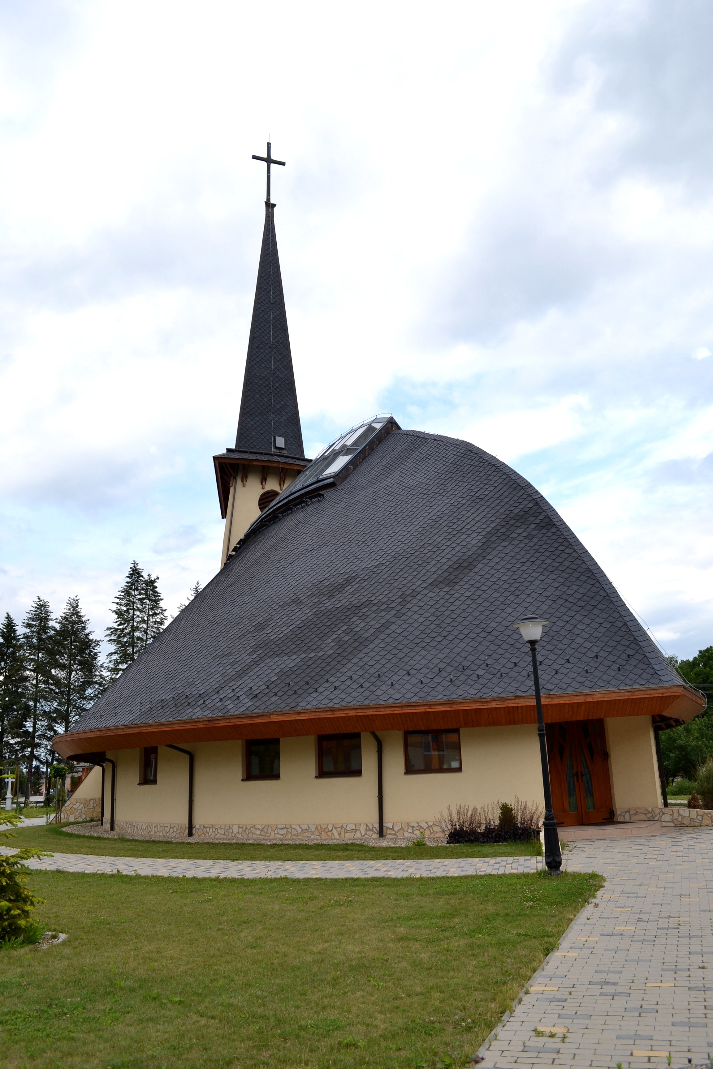 Rešica (okr. Košice-okolie), Kostol Ružencovej Panny Márie